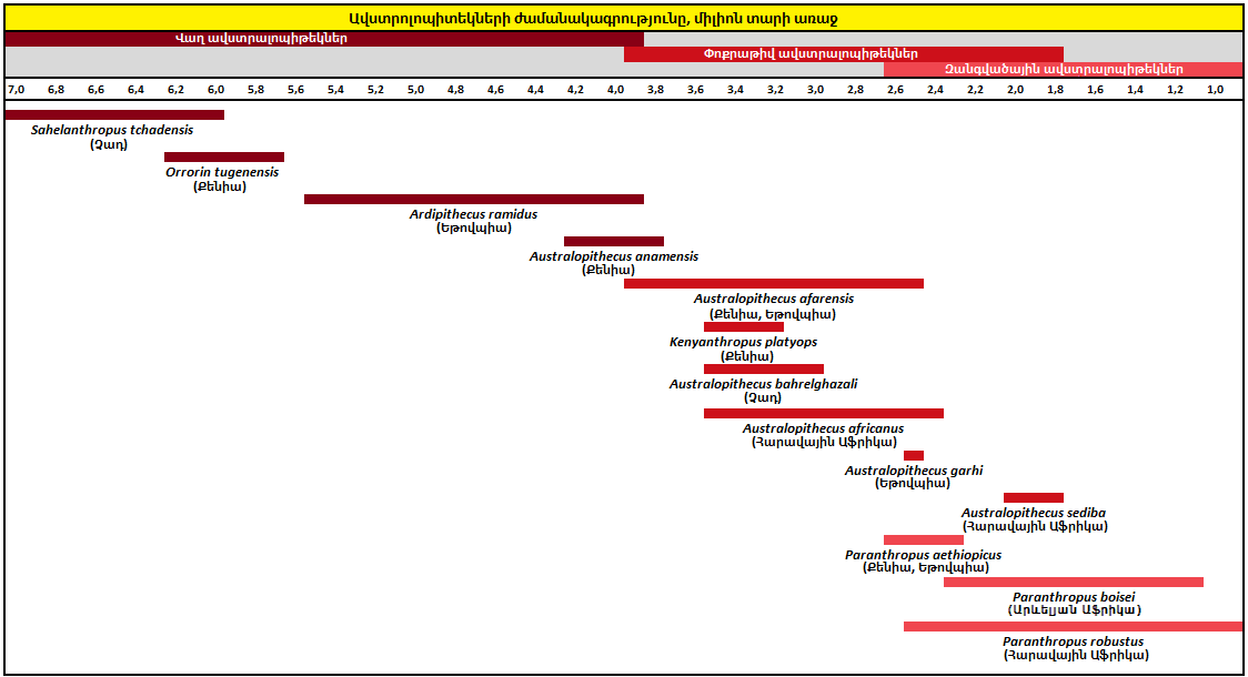 Ավստրոլոպիտեկների ժամանակագրությունy